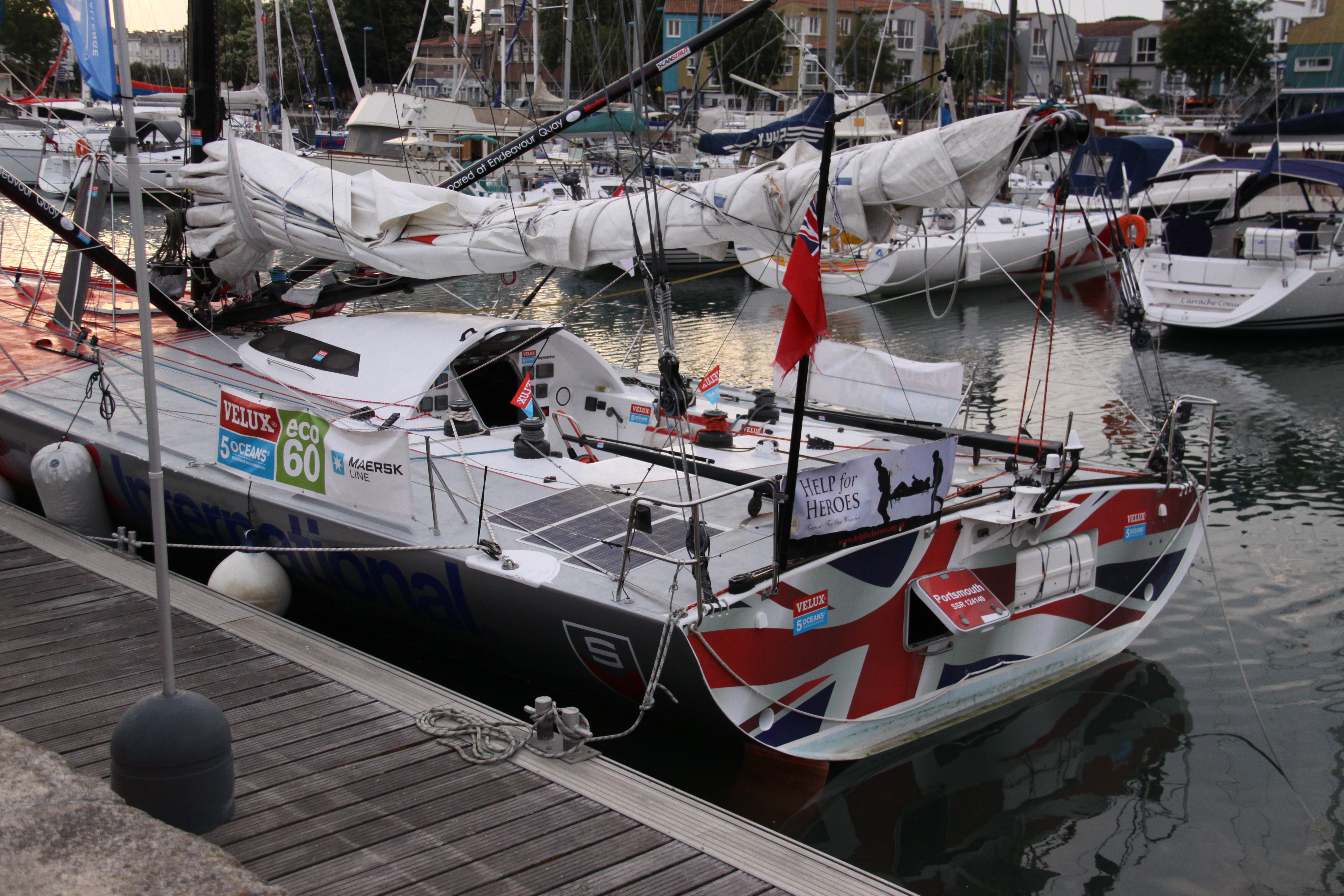 Le voilier de course "Spartan" dans le Bassin des Chalutiers à La Rochelle après avoir terminé la course autour du monde en monocoque et en solitaire Velux 5 Oceans 2010-2011 (La Rochelle - La Rochelle). "Spartan" est un des premiers voiliers de course Open 60 de troisième génération à voir été mis aux normes de la classe Eco 60 créée pour la Velux 5 Oceans 2010-2011. "Spartan" a été construit en 1997. Il mesure 60 pieds (18,28 mètres) de long et 5,70 mètres de large. Il a changé 7 fois de nom. Ancien "Fila". Skipper: Christopher Stanmore-Major, Grande Bretagne, Quatrième de la Velux 5 Oceans 2010 -2011. La Rochelle, Charente Maritime, France.